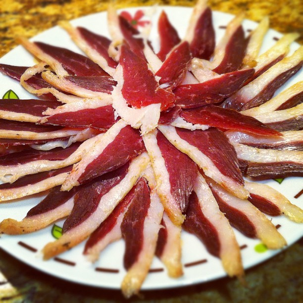 Jamón de pato.